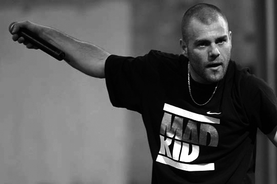 Zenit Hombre Don